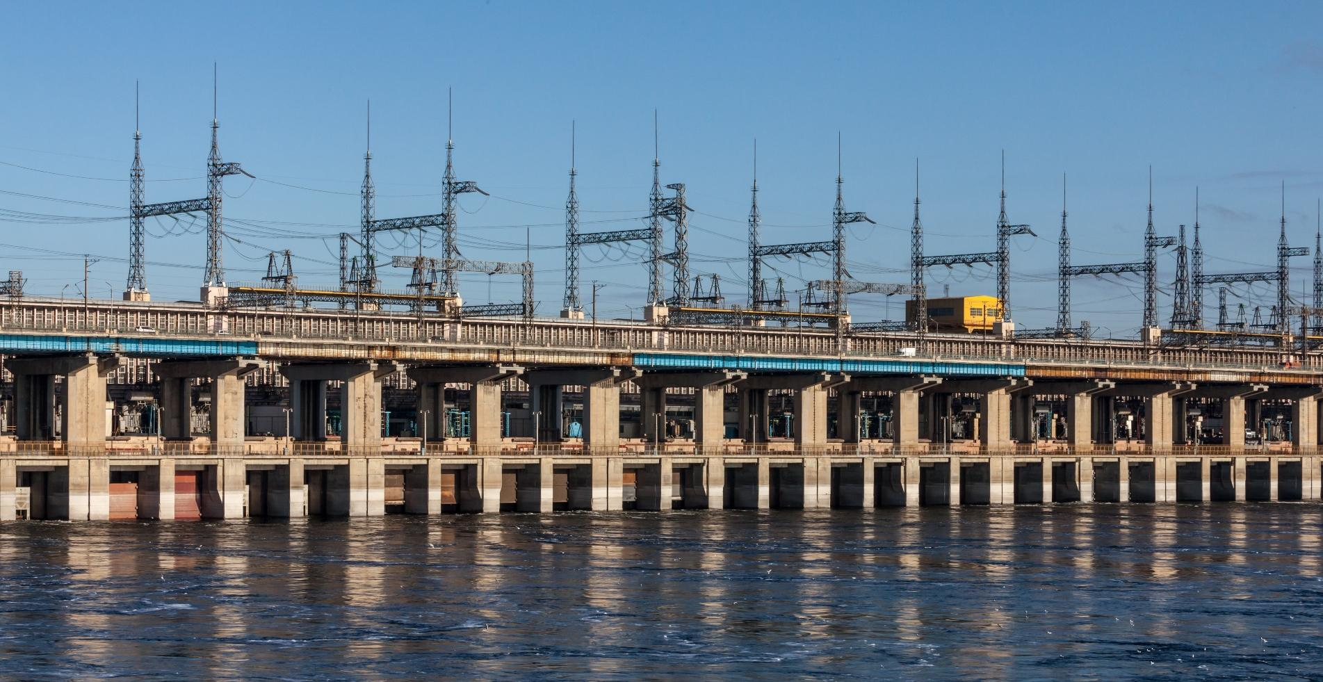 Волжская ГЭС